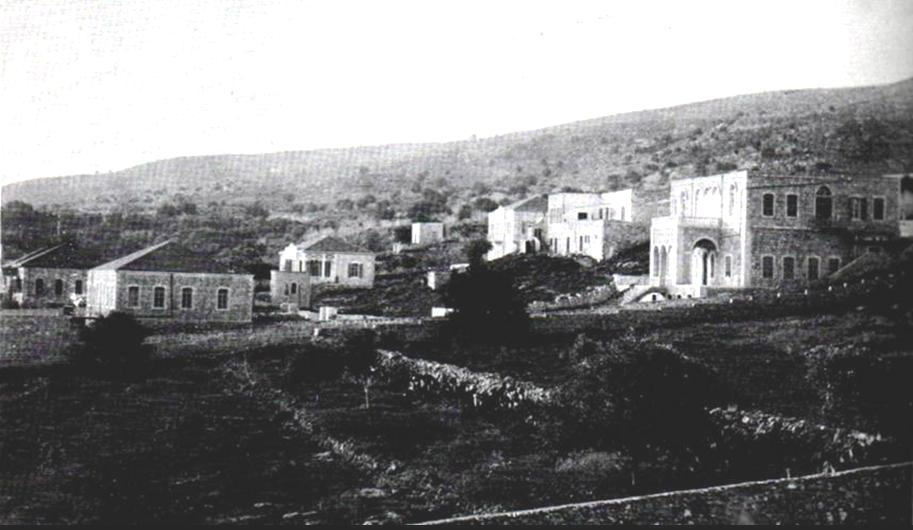 Historical images of Haifa תמונות היסטוריות של חיפה שכונת הרצליה בהדר הכרמל בחיפה תמונה משנת 1907